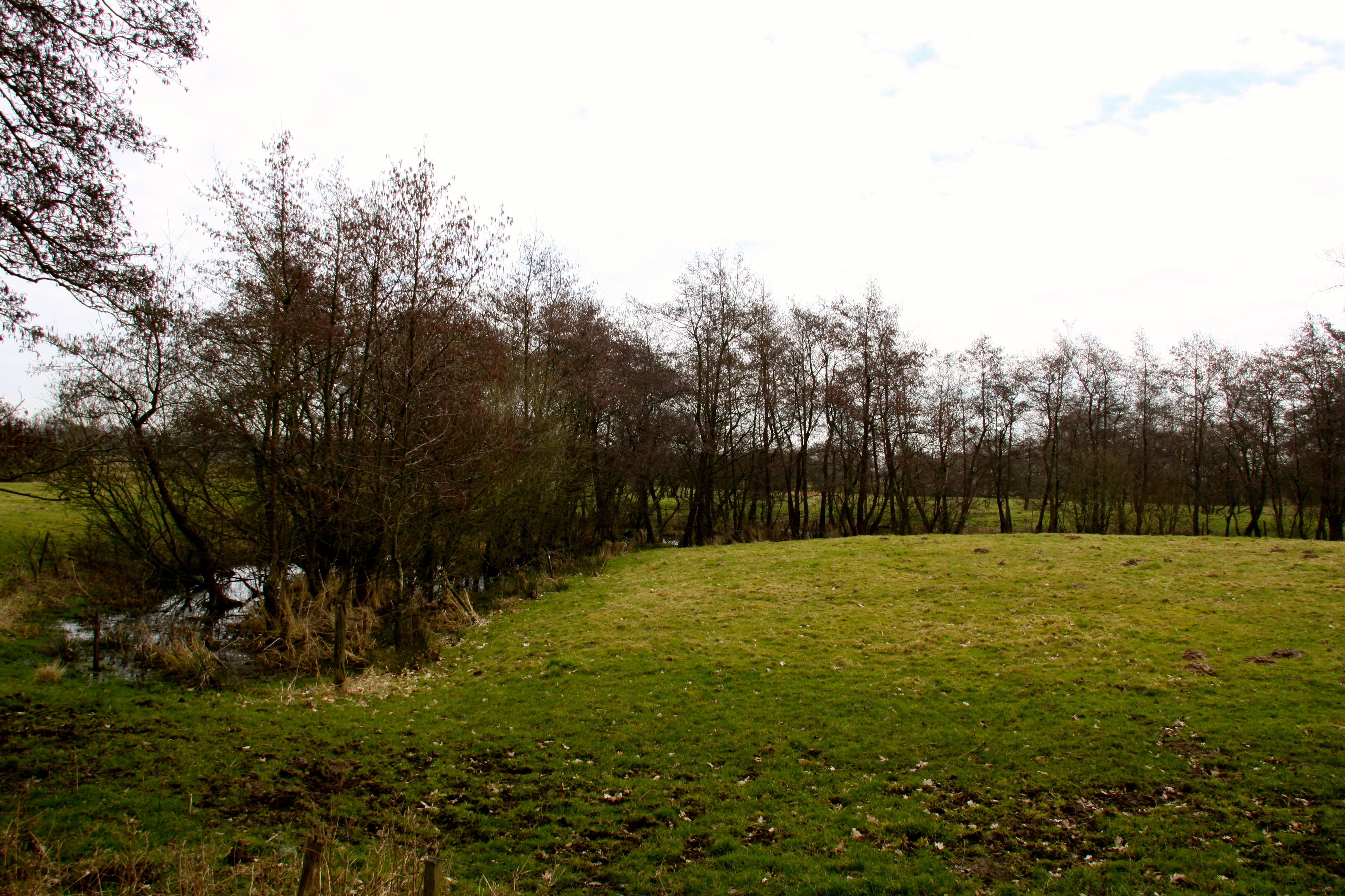 Reste der Dieler Schanze in Weener.